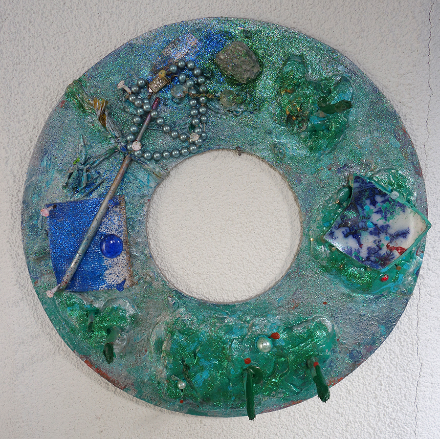 Tableau Vivant, krachtcirkel 2 zijdig beschilderde houten cirkel, 35 cm, 2019